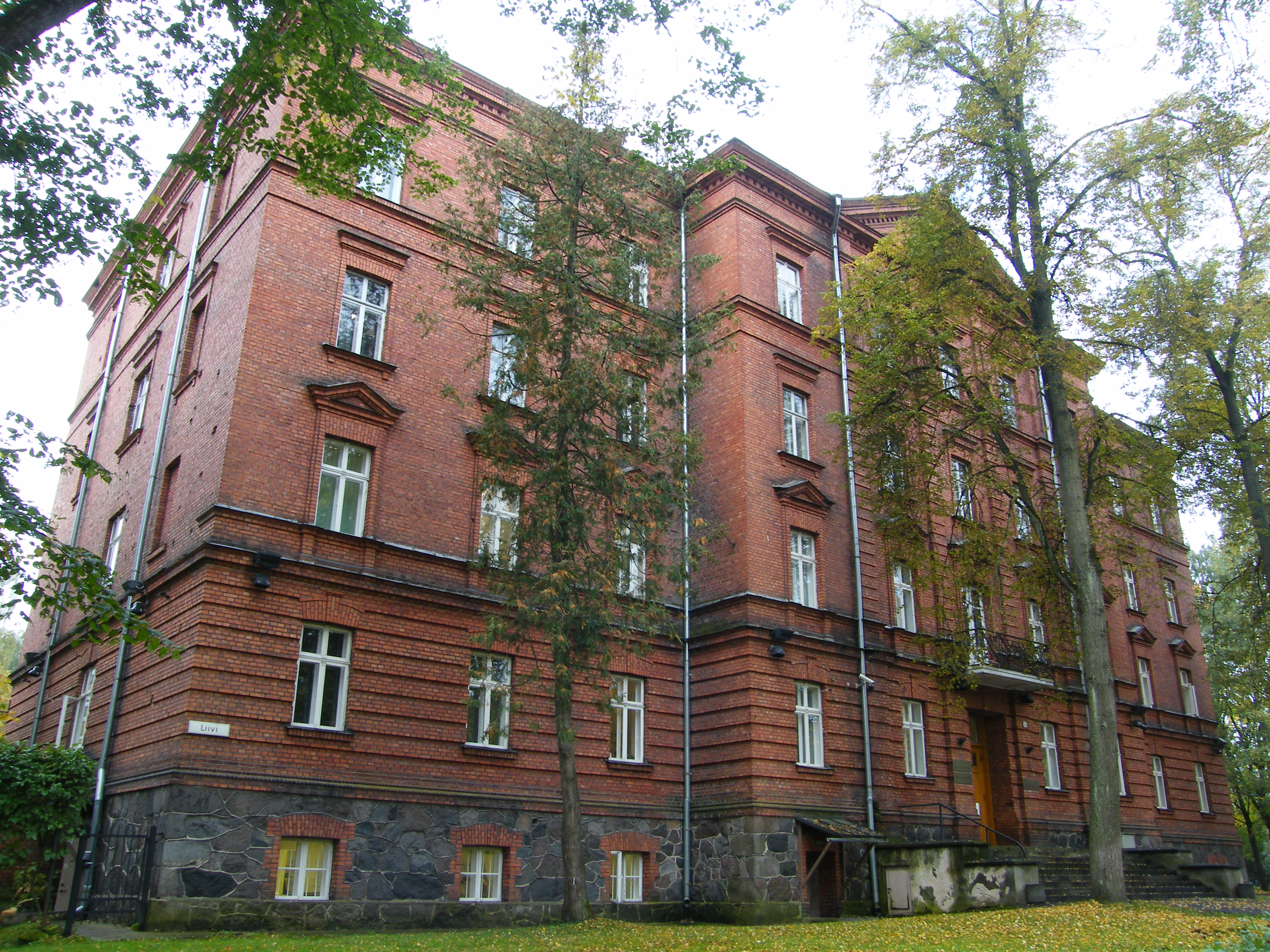 J. Liivi 4